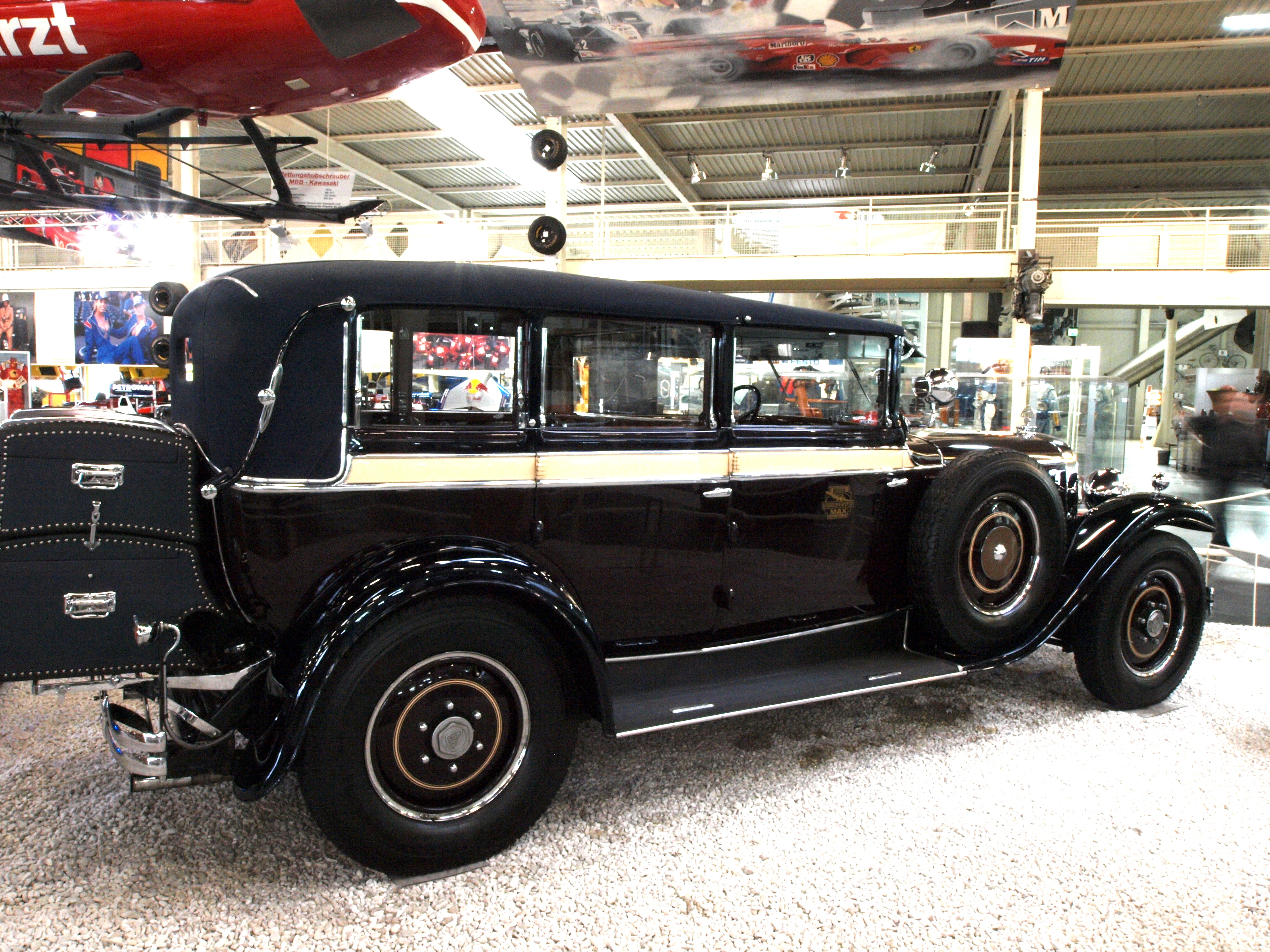 Maybach Zeppelin DS7